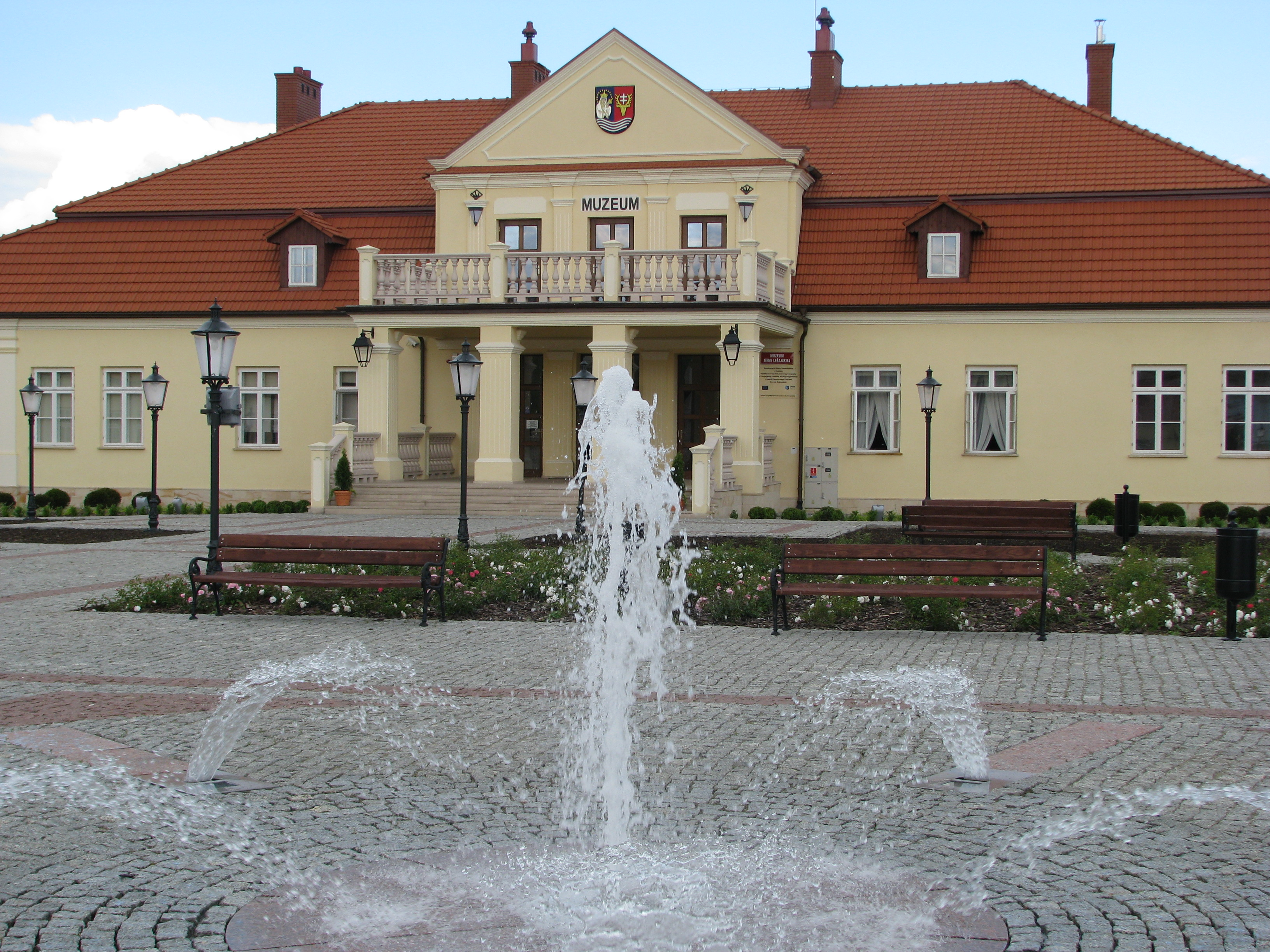 Leżajsk, dwór starościński, ob. Muzeum Ziemi Leżajskiej, 1760-1770, 1933